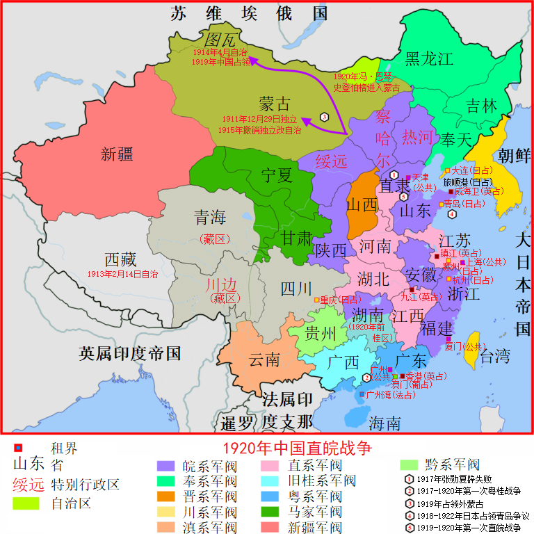 Carte des évènements historiques de la Chine entre 1917 et 1920